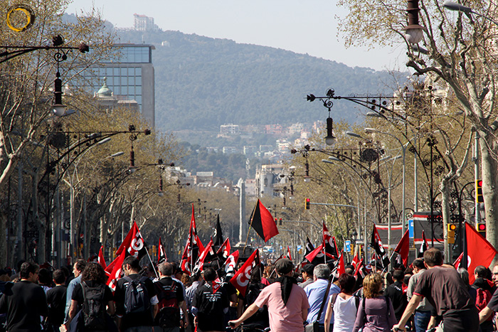 Manifestantes del sindicato CGT por Barcelona el día de la huelga general del 29 de marzo de 2012